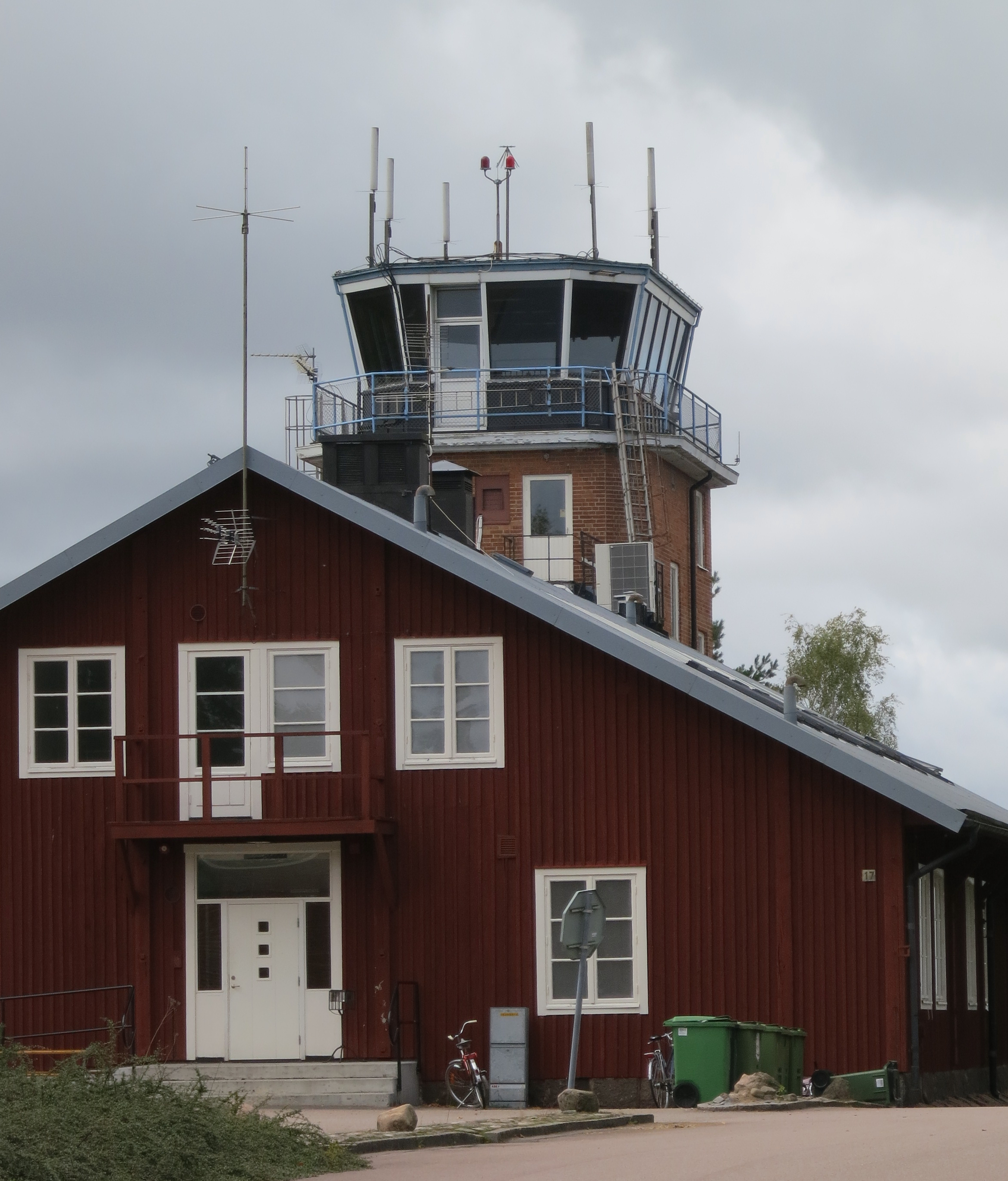 Ljungbyheds flygledartorn